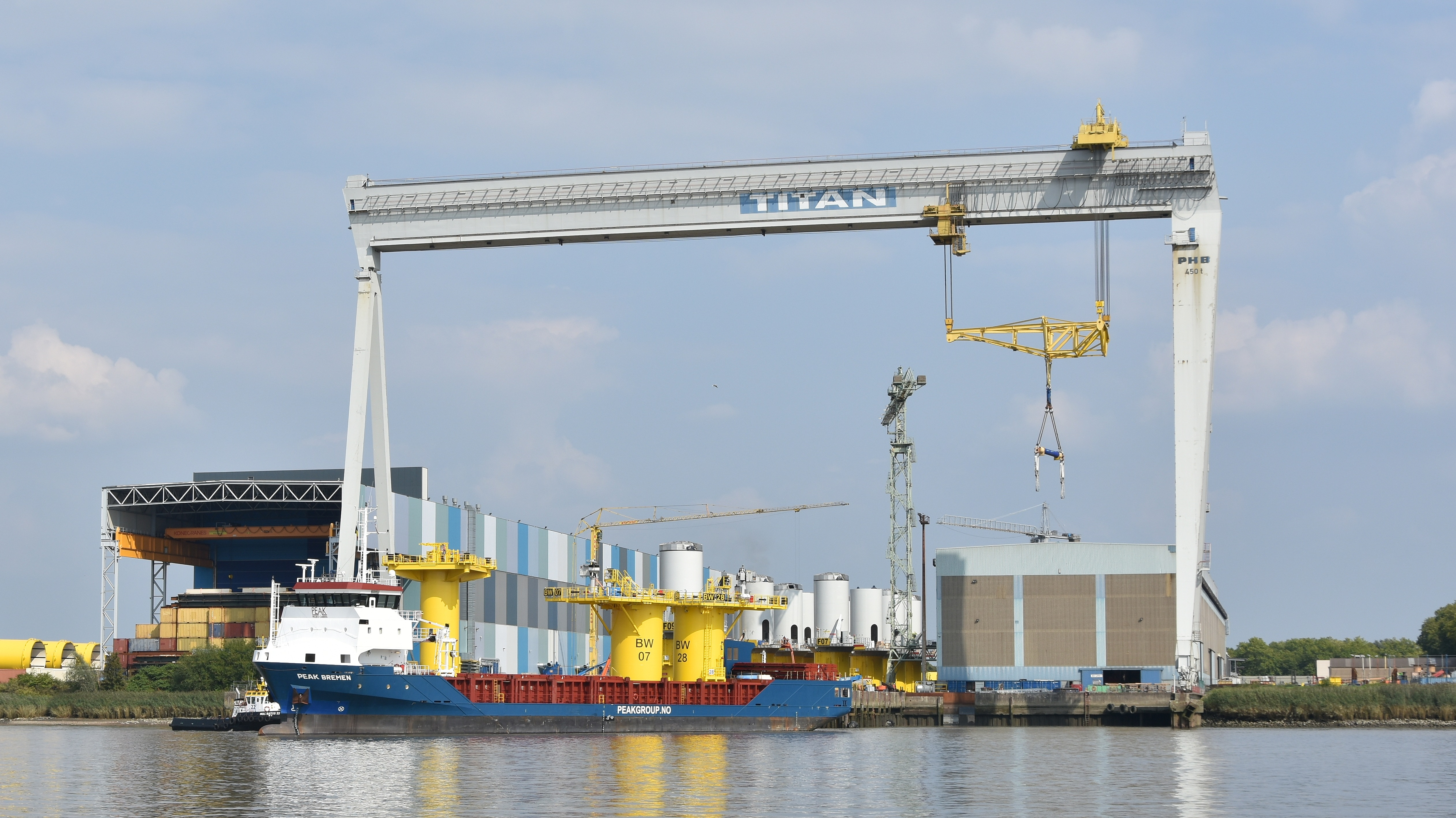 Hoboken voormalige scheepswerf Cockerill - nu Smulders Projects Belgium 21-08-2018